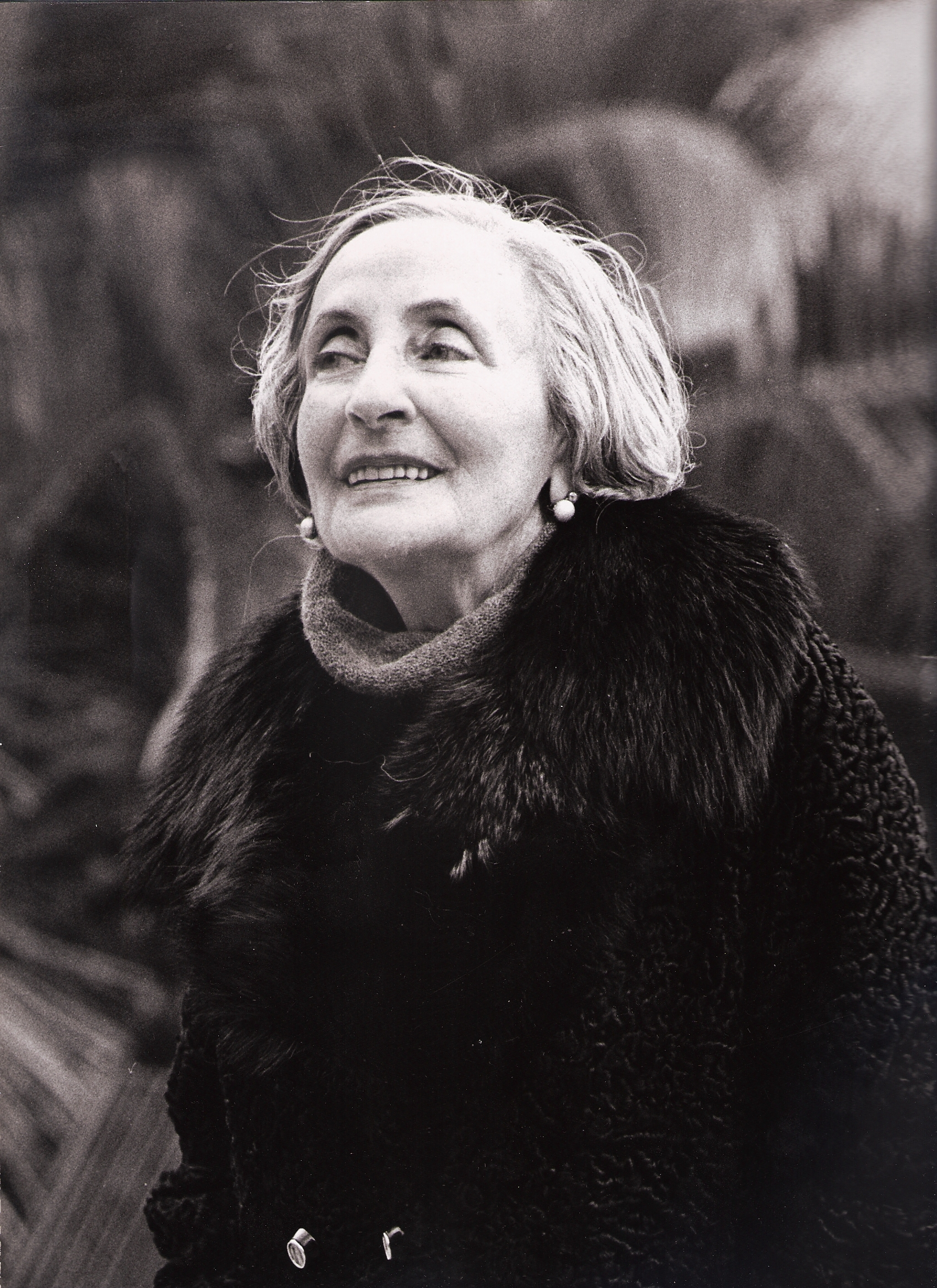 Lia Pasqualino Noto, primi anni '80